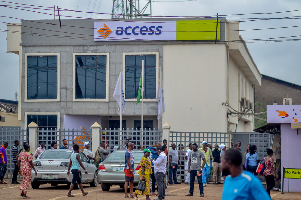 Fine coat, Kola, Lagos